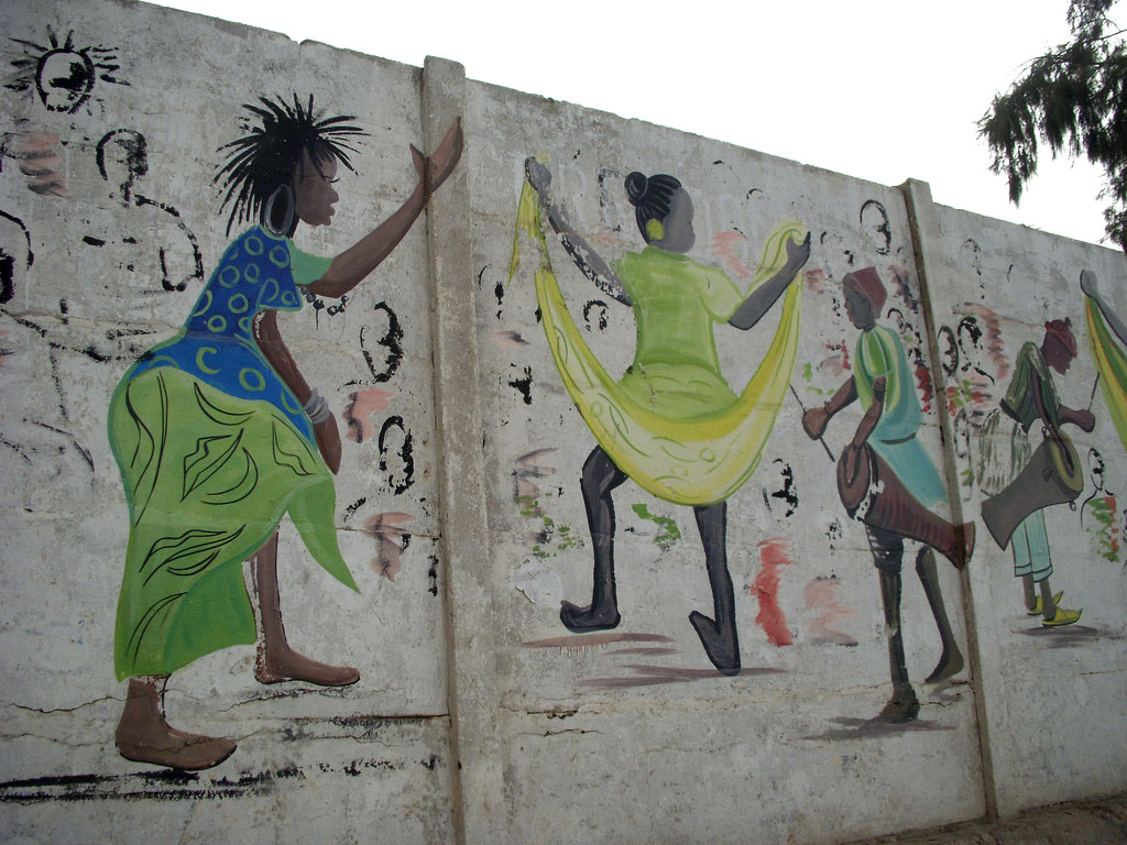 Fresque à Dakar (Sénégal) sur le thème de la danse traditionnelle